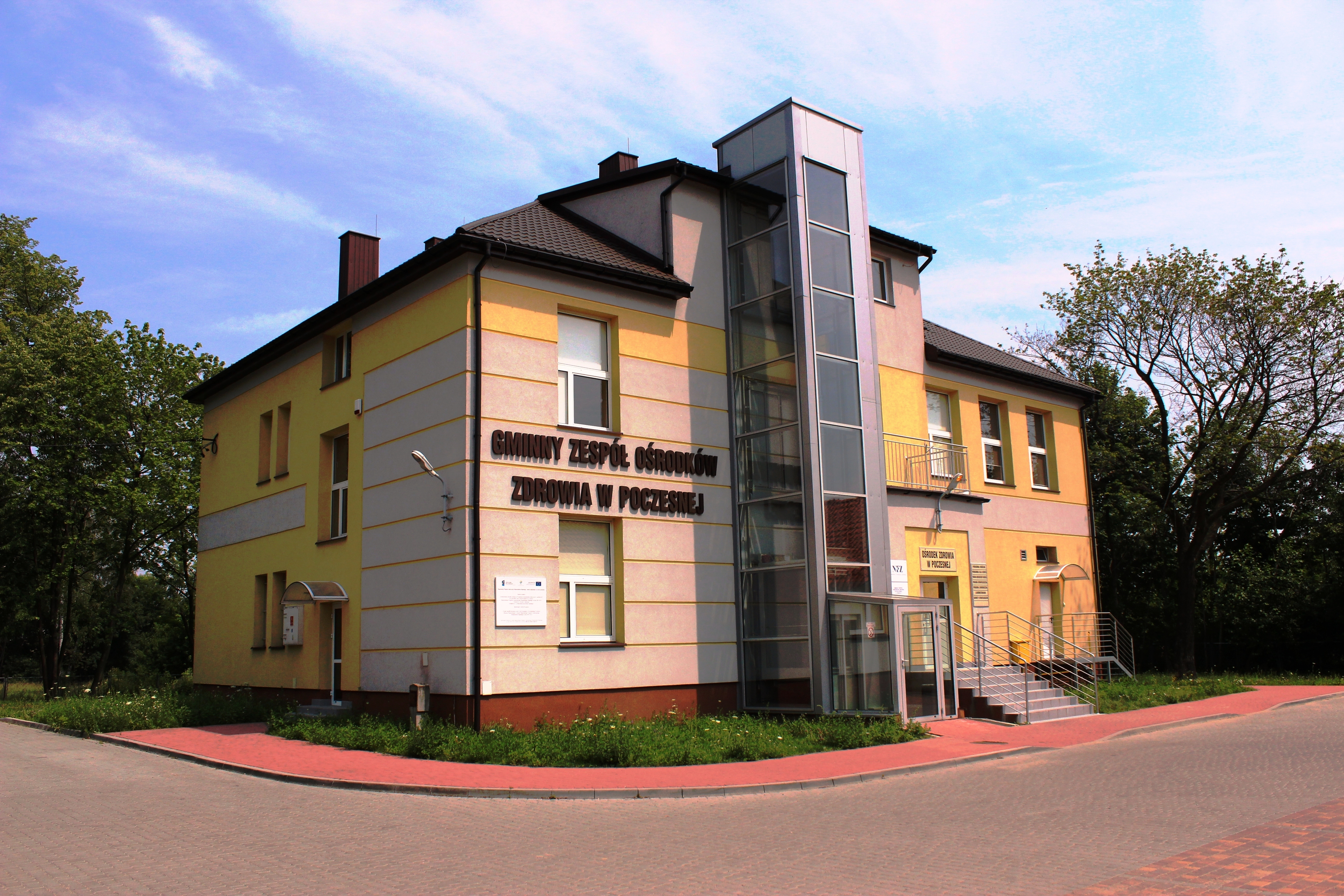 Gminny Zespół Ośrodków Zdrowia w Poczesnej. Autor Michał Kryczek.